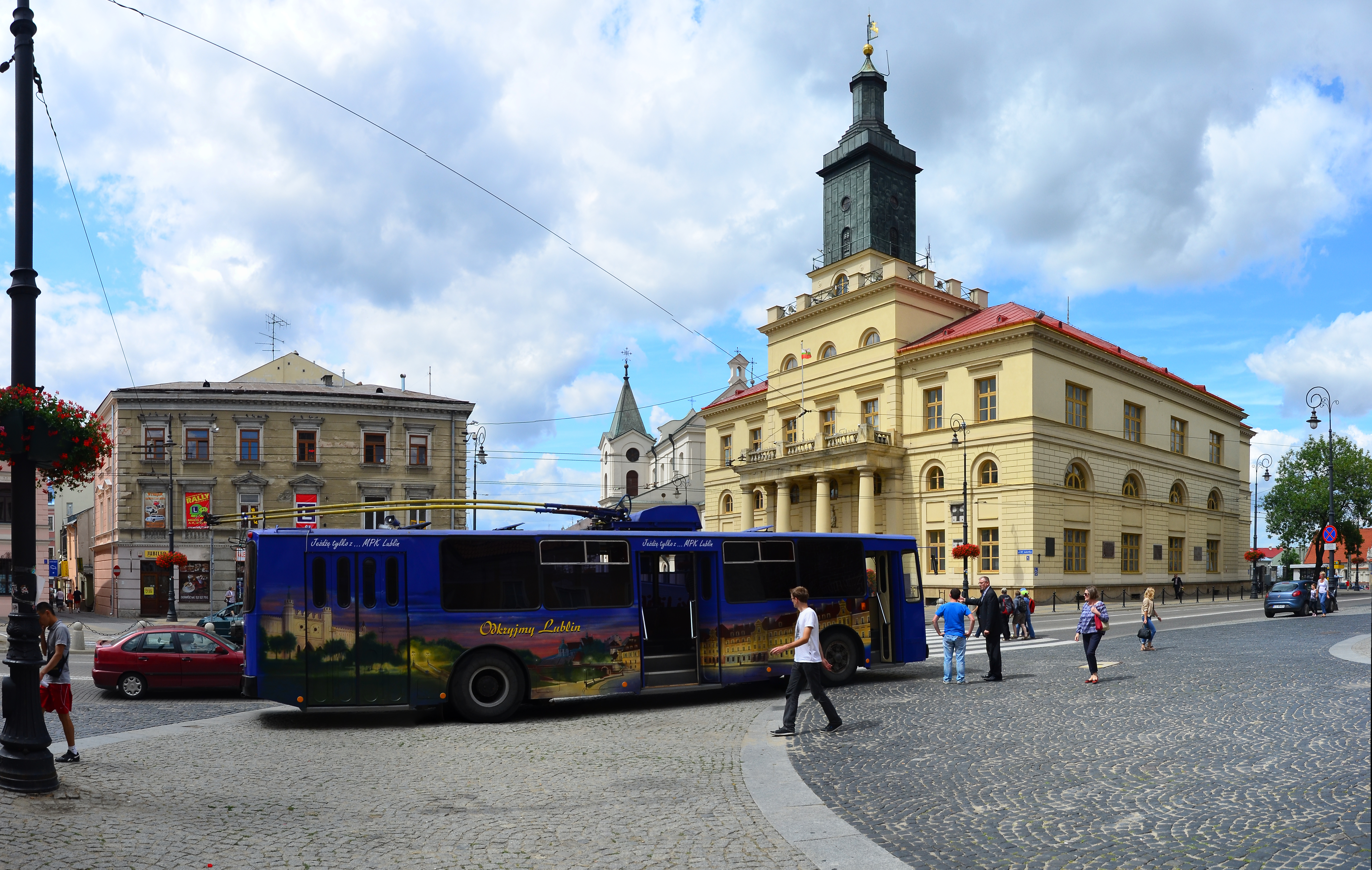 Wycofany ze służby liniowej i przebudowany w celu promocji miasta trolejbus marki ZIU-9, stojący przed Ratuszem w Lublinie. Obraz poprawiony programem ShiftN